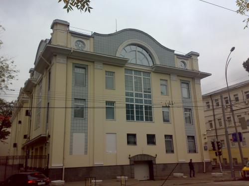 Мосэнка Кэпитал Плаза - московский офис OOO «Эр Ликид». Ул. Воронцовская, 17